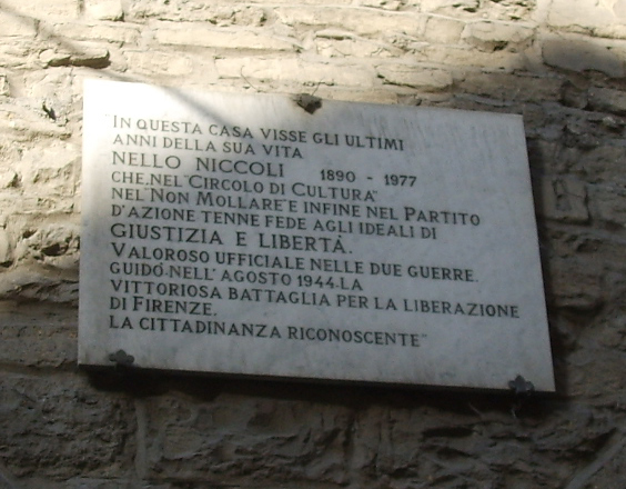 Via san niccolò, targa nello niccoli